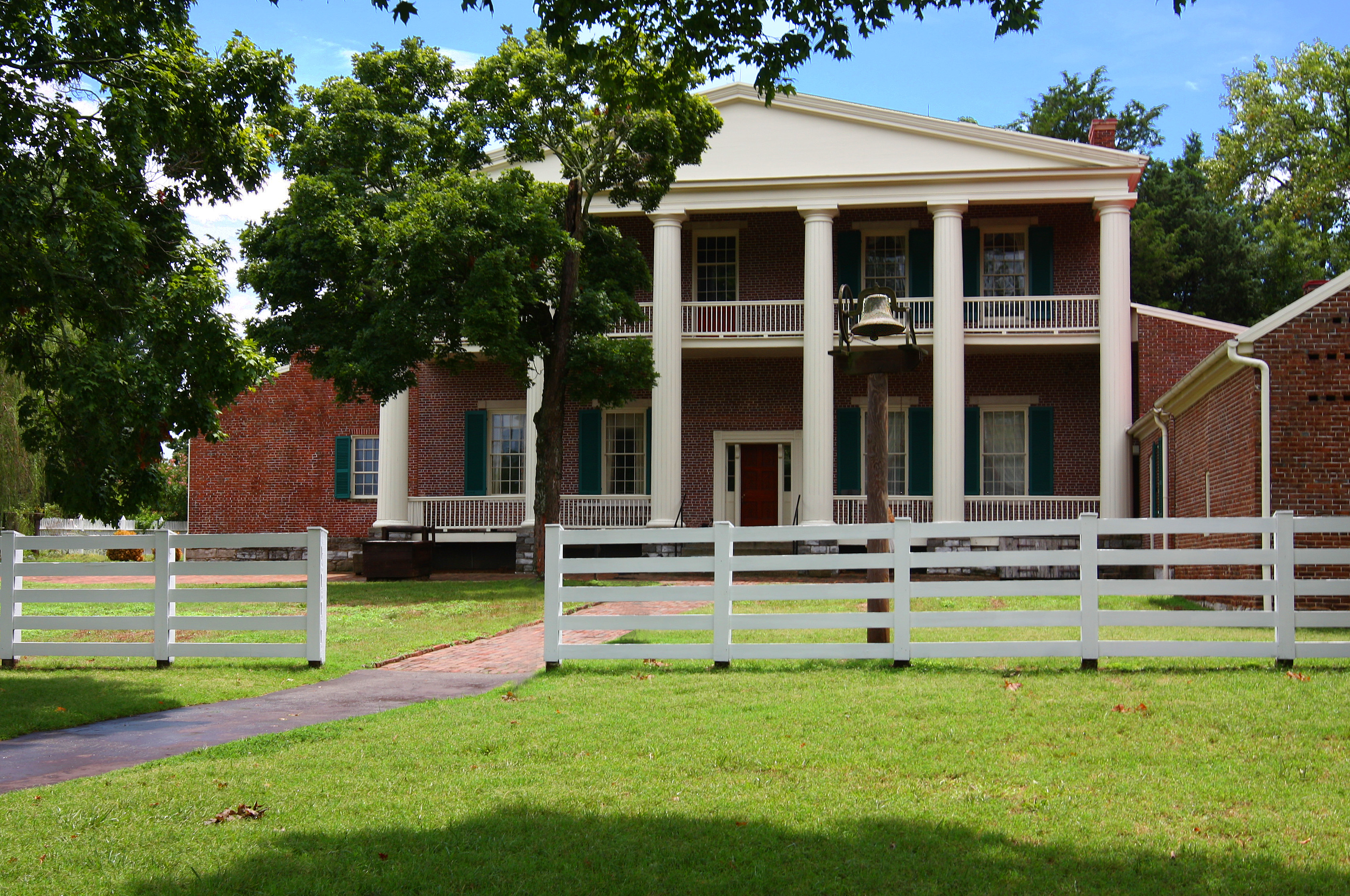 Hermitage Back Area